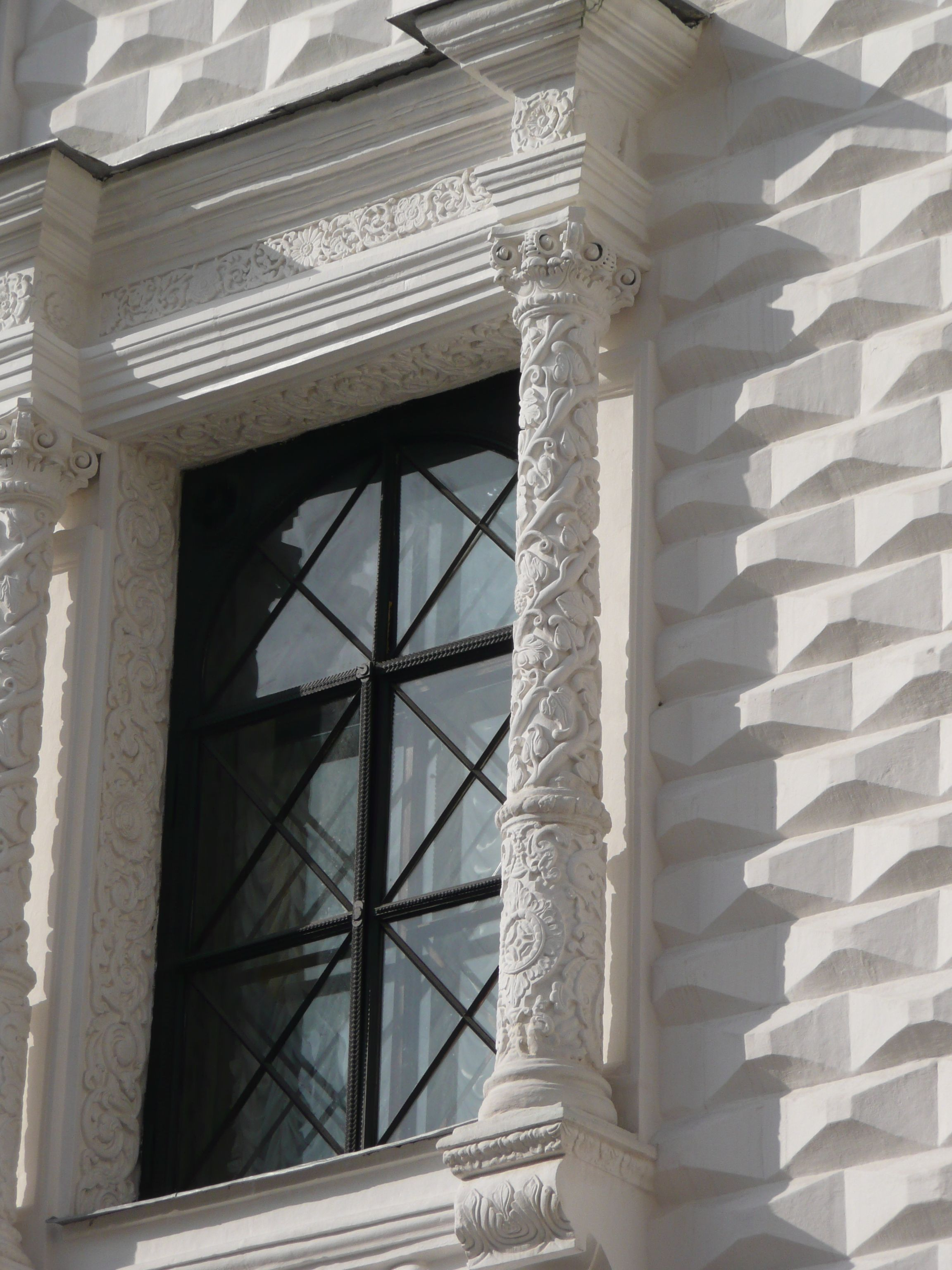 Facettenpalast im Moskauer Kreml, Fensterdetail